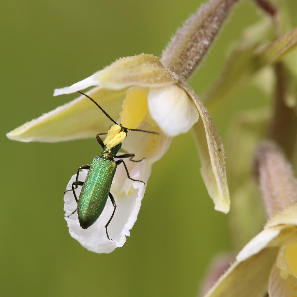 Epipactis palustris pollinisé par Chrysanthia viridissima, Landes, France